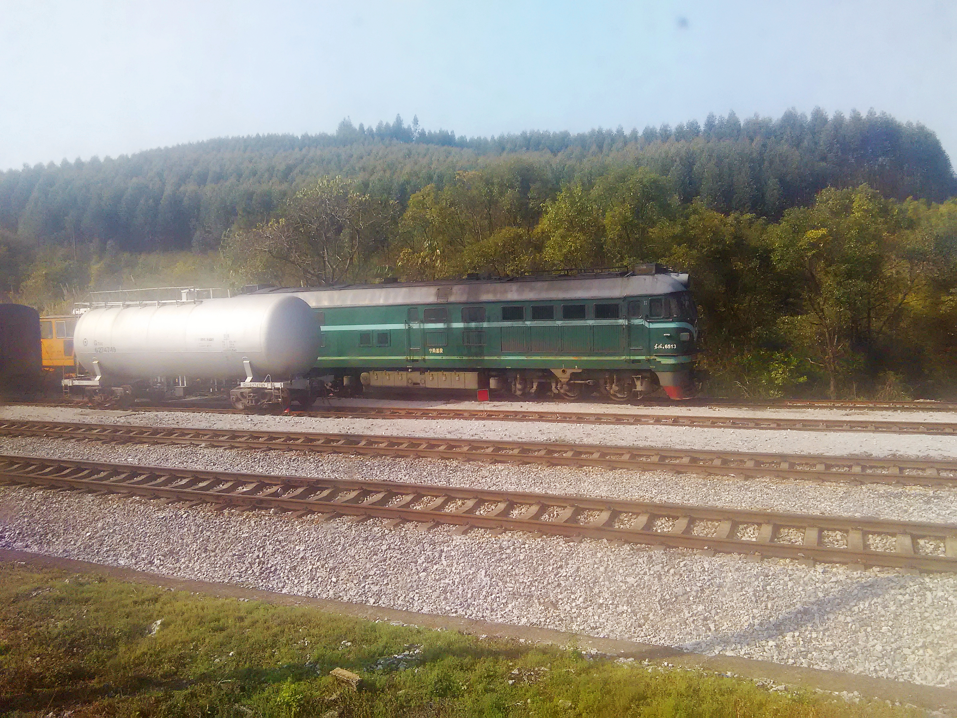 拍摄于柳州洛埠站。